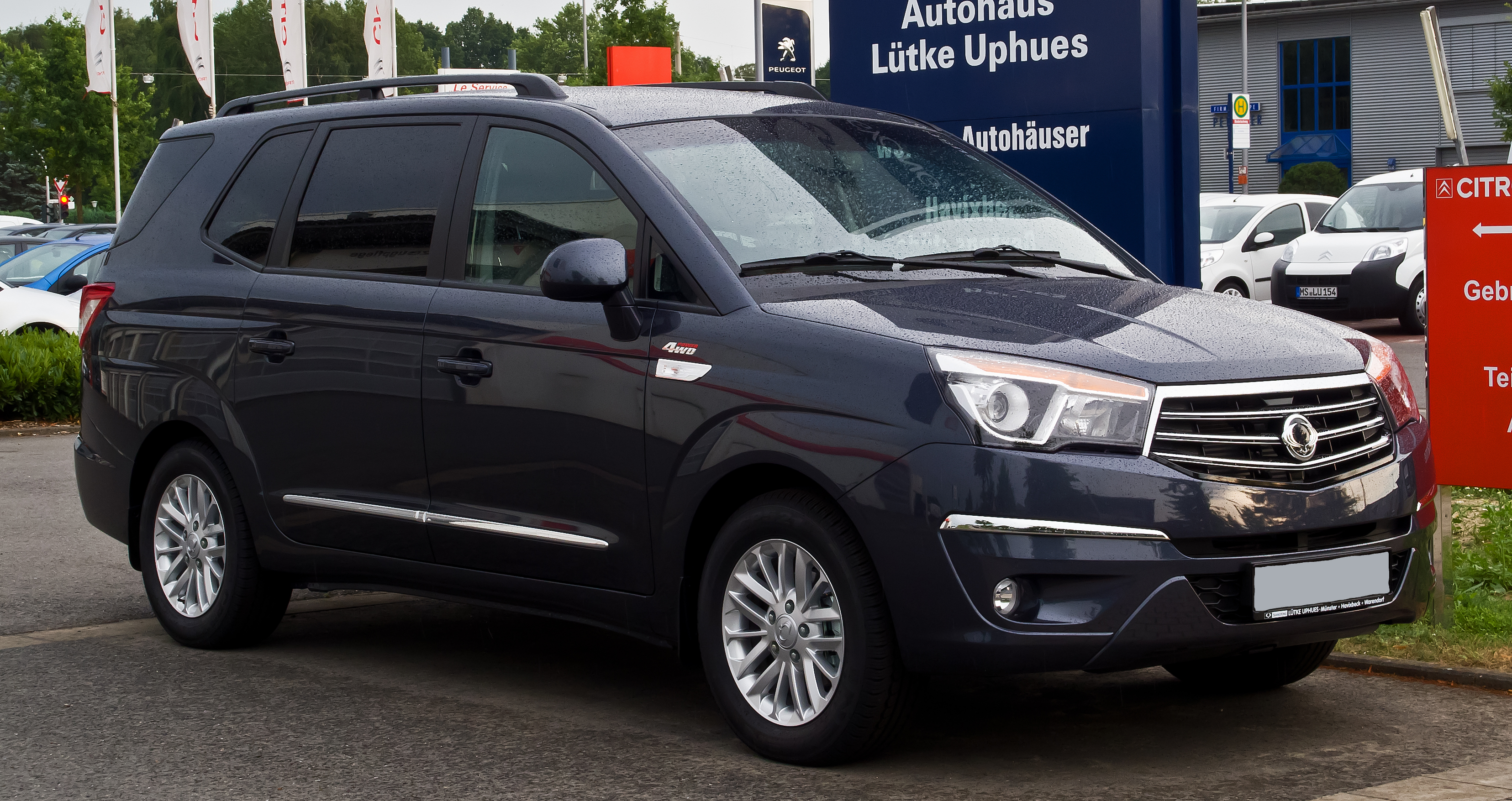 SsangYong Rodius e-XDi 200 4WD Sapphire (II)